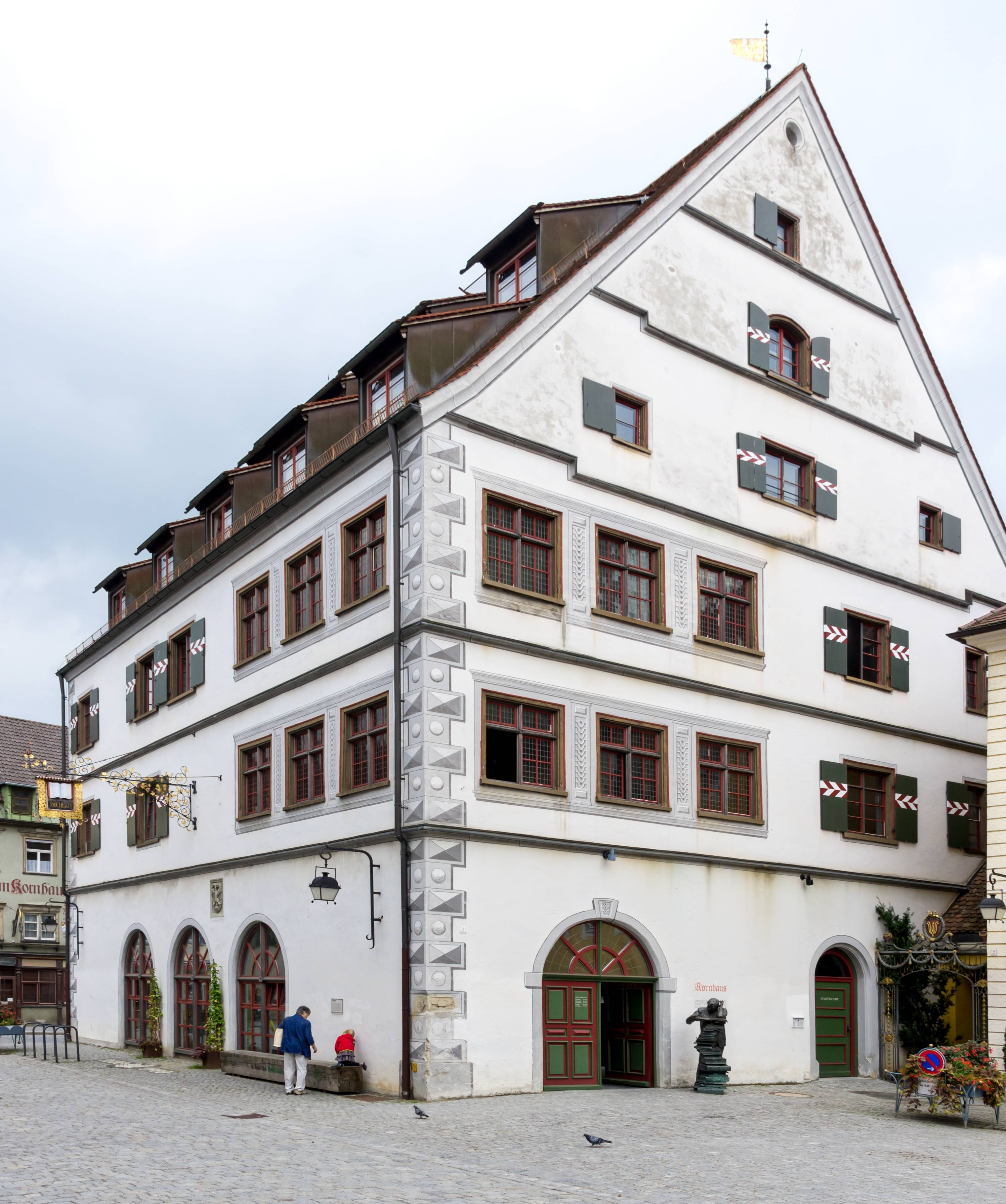 Bilder aus Wangen im Allgäu